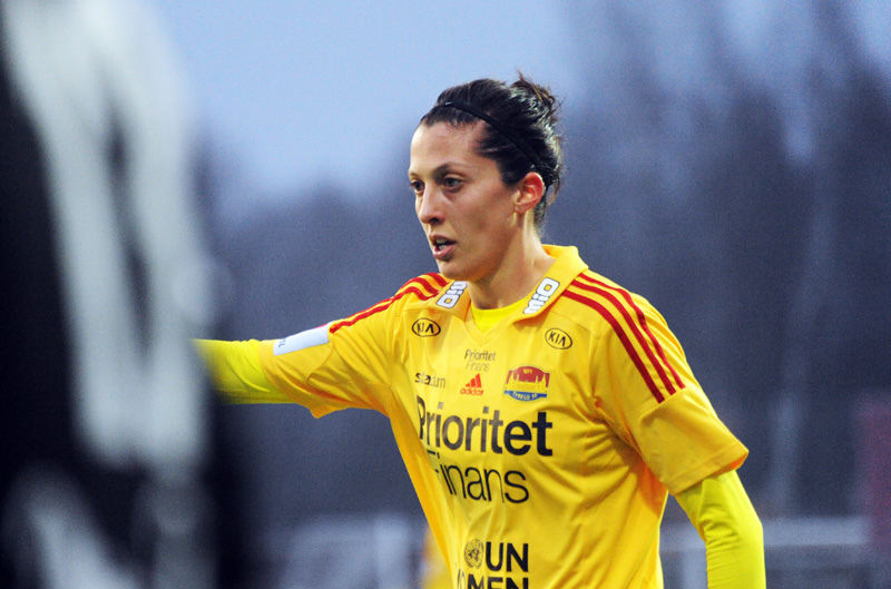 a_42_3743